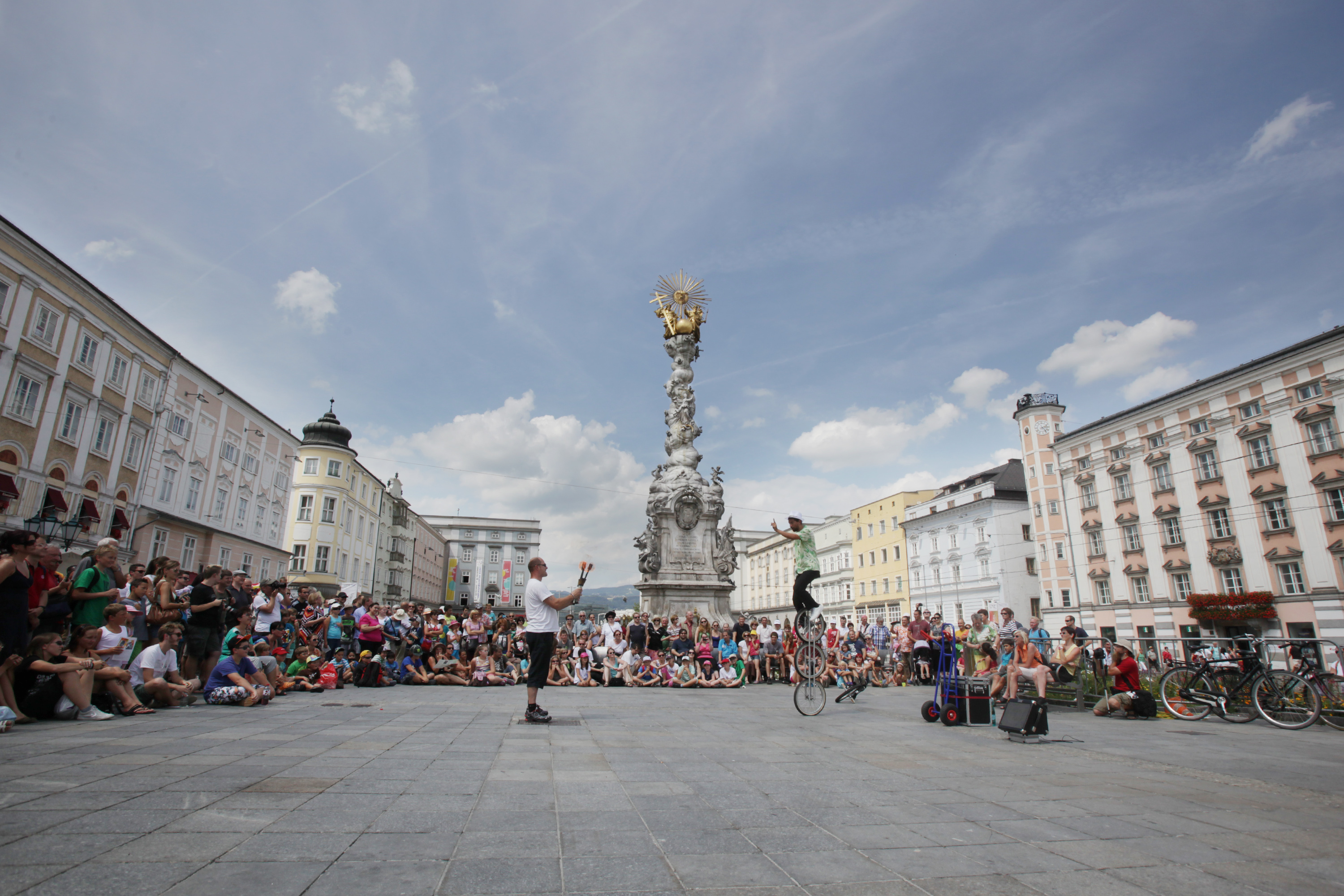 Pflasterspektakel 2013: Straßenkünstler am Linzer Hauptplatz